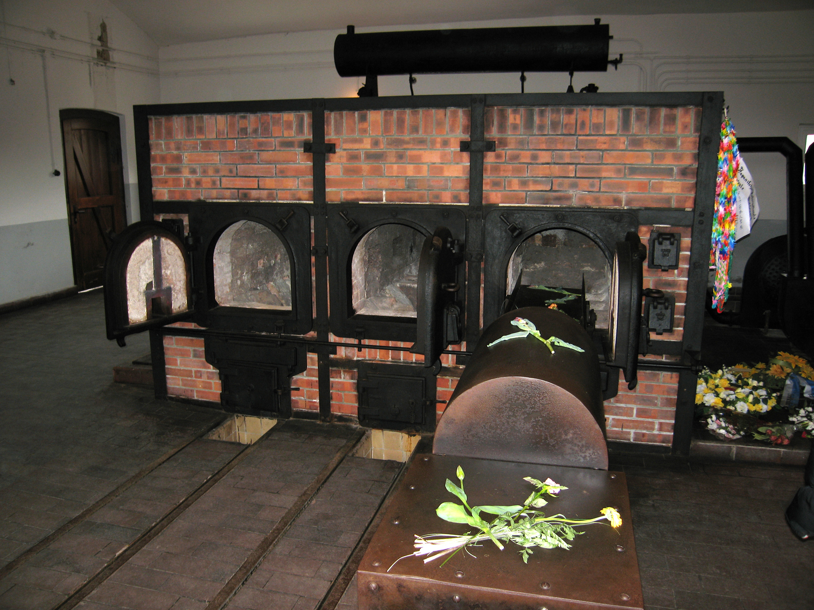 Krematorium im KZ Buchenwald. Vorderseite von drei der insgesamt sechs Öfen im KZ.